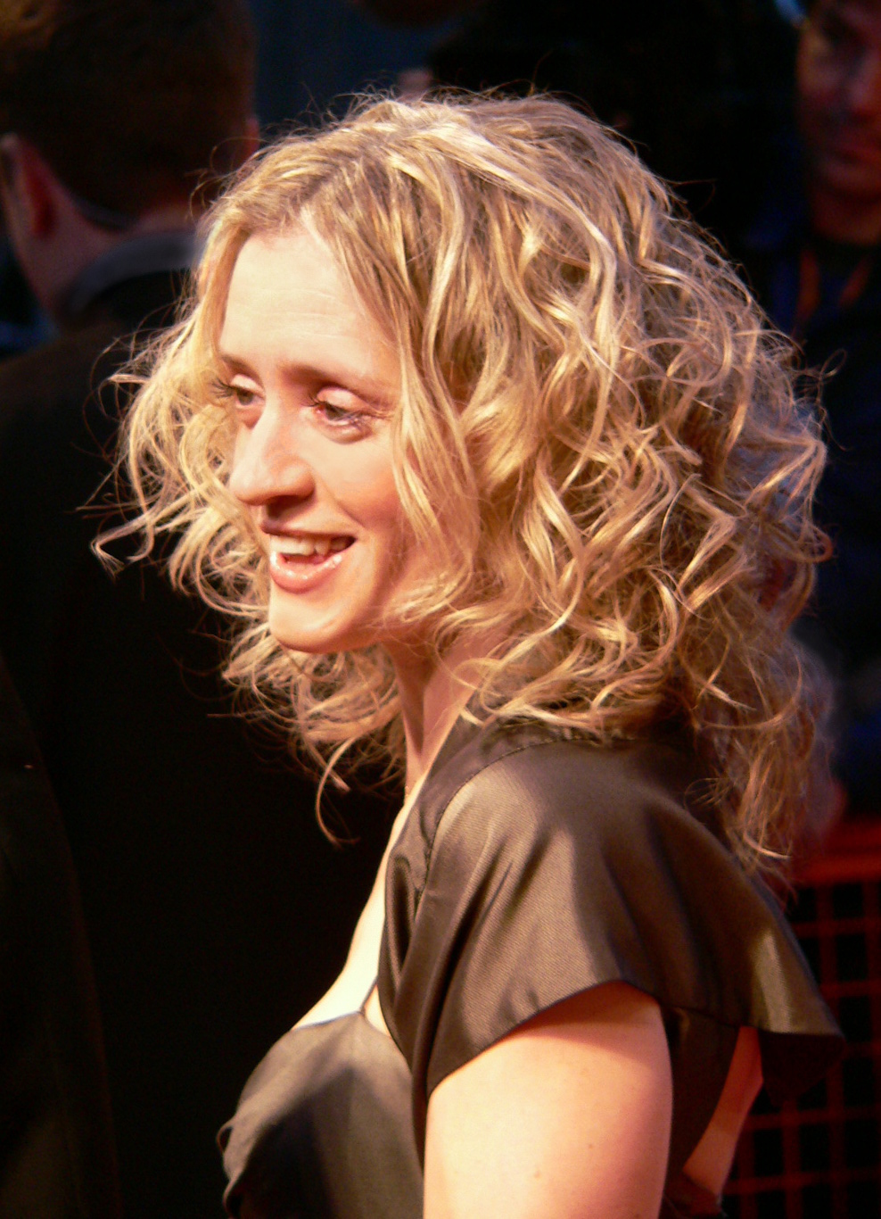 BAFTA 2007